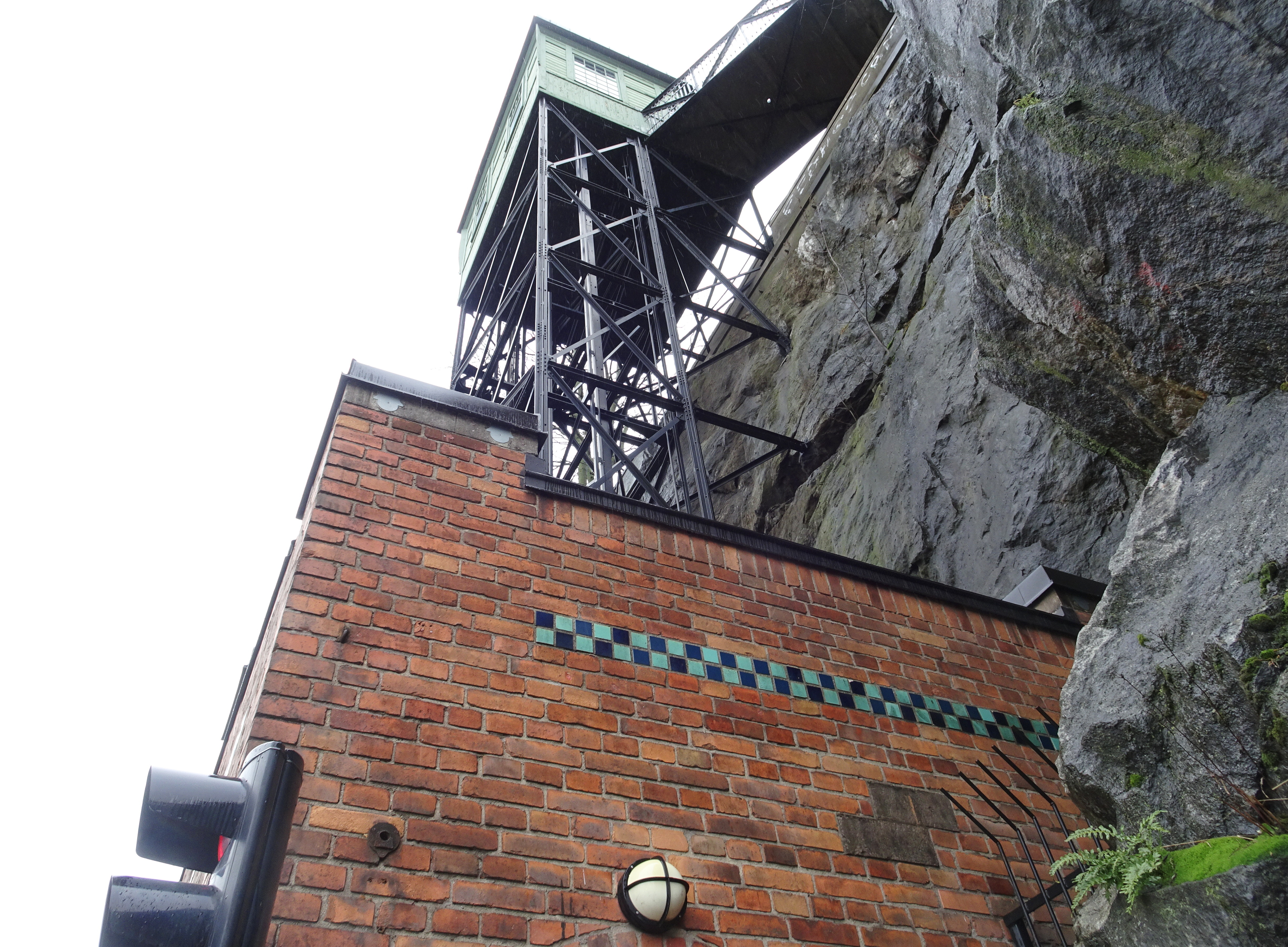 Stadsgårdshissen, nedre station